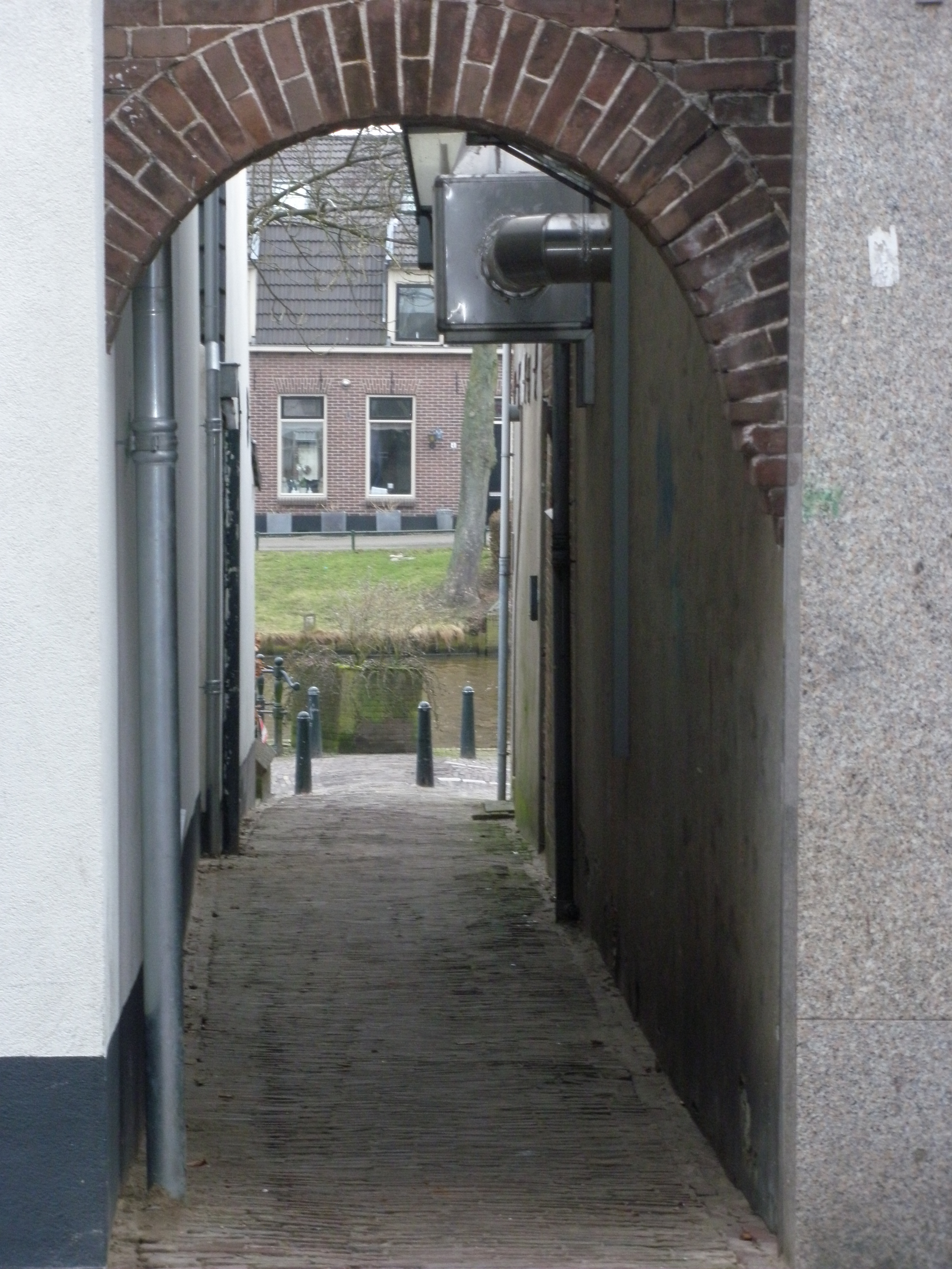 Steeg in Montfoort. Deze verbindt de Hoogstraat met Onder de Boompjes aan de Hollandse IJsselkade.